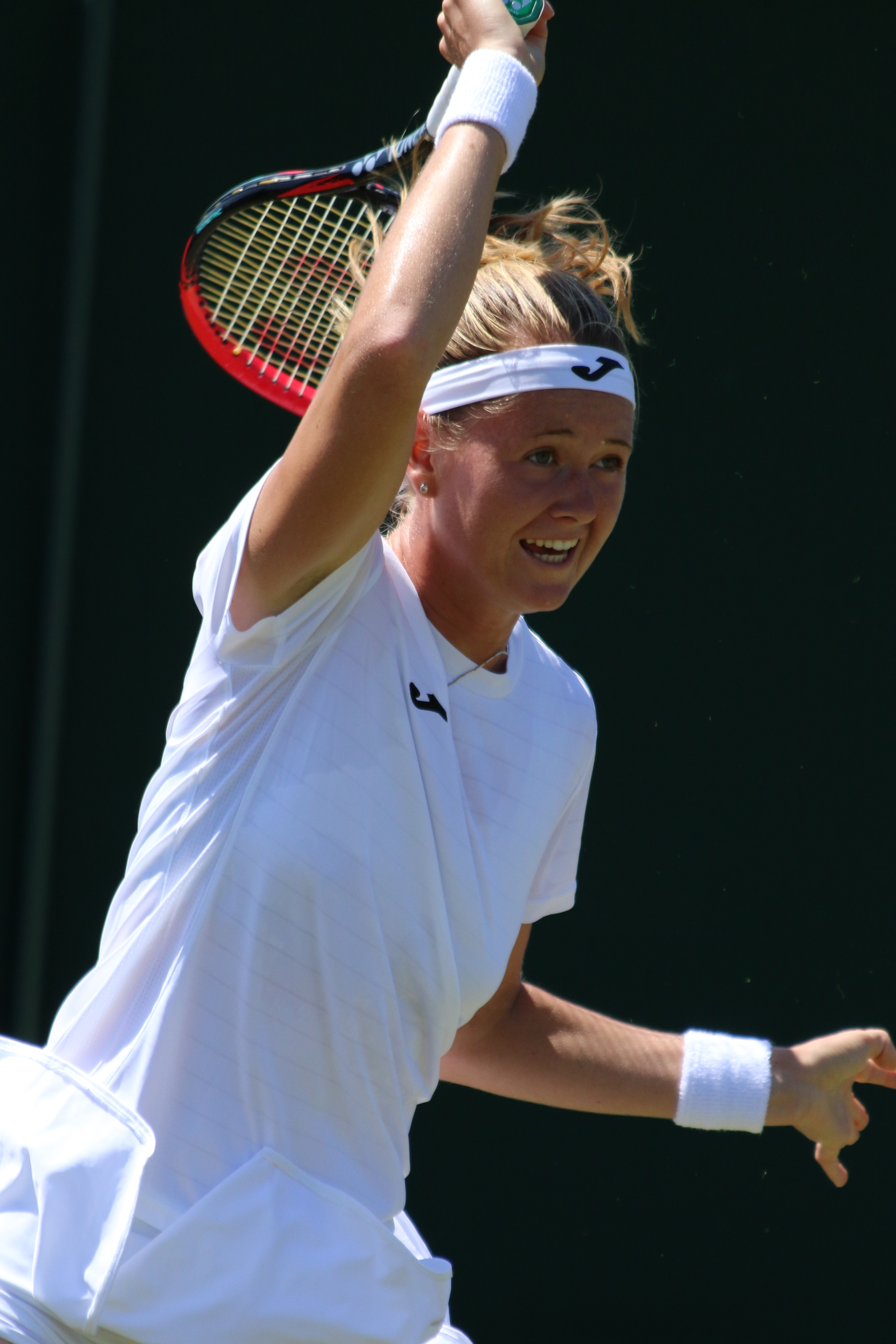 Bouzkova WMQ18 (14)